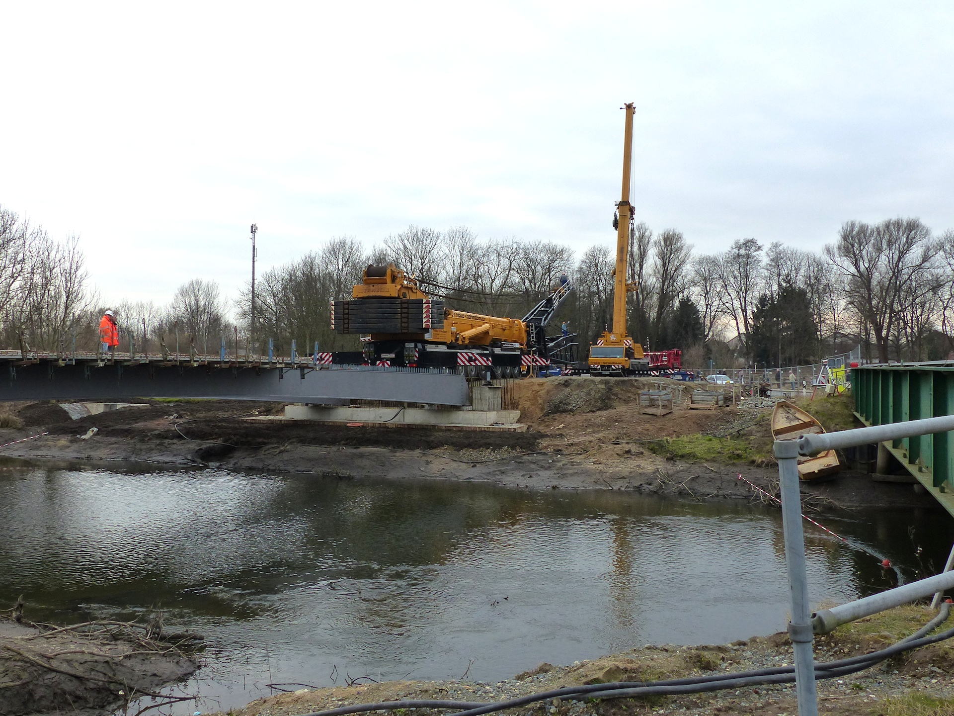 Bauarbeiten an der Brücke Frühjahr 2015